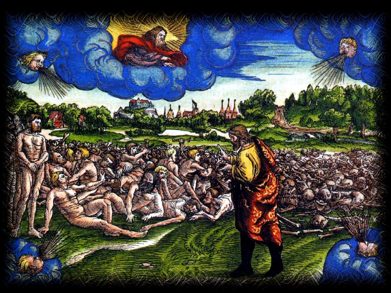 Lutherbibel 1534, Illustration zu Ezechiel 37: Die Auferweckung der Totengebeine Israels